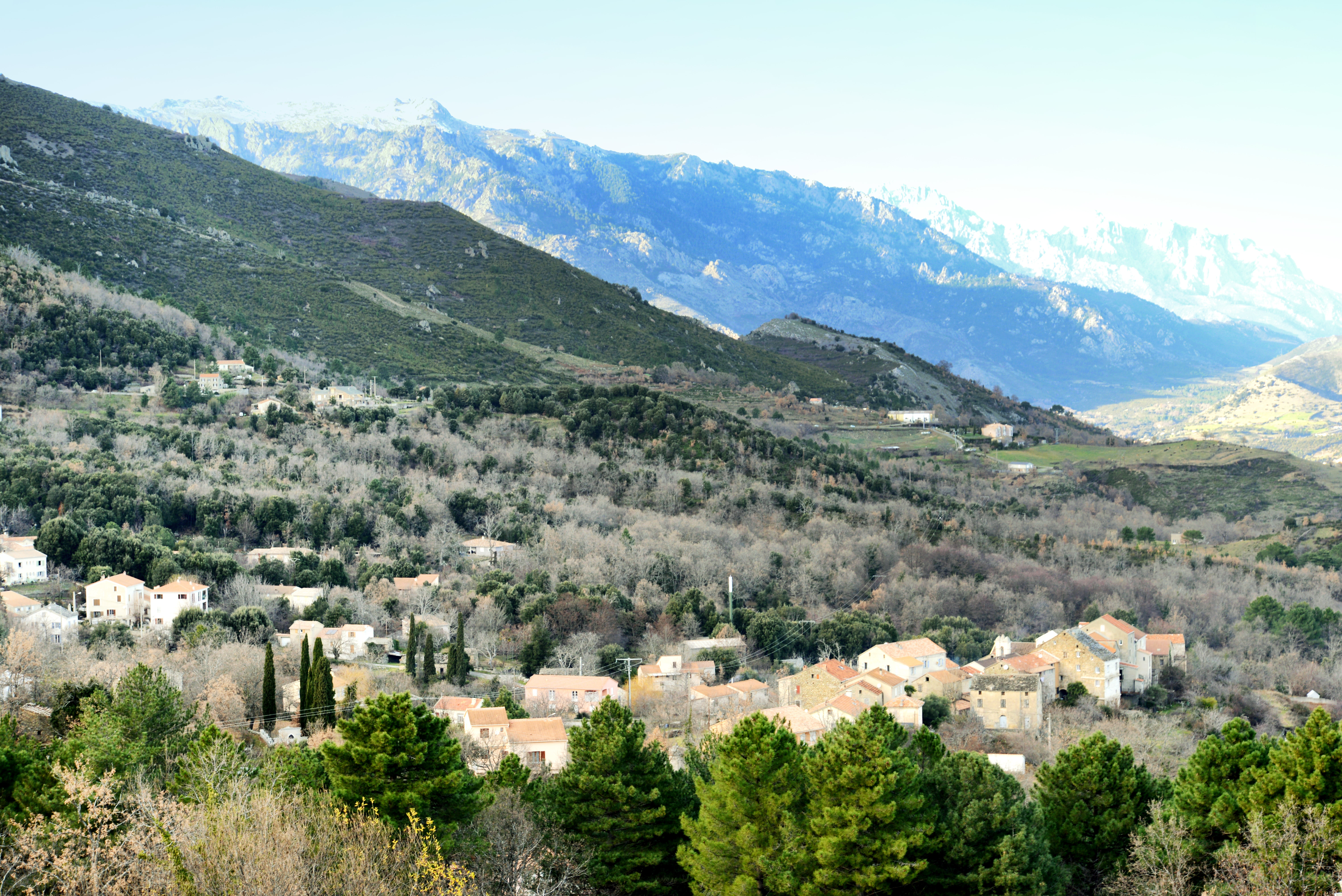 Casanova, Venacais (Corse) - Vue du village